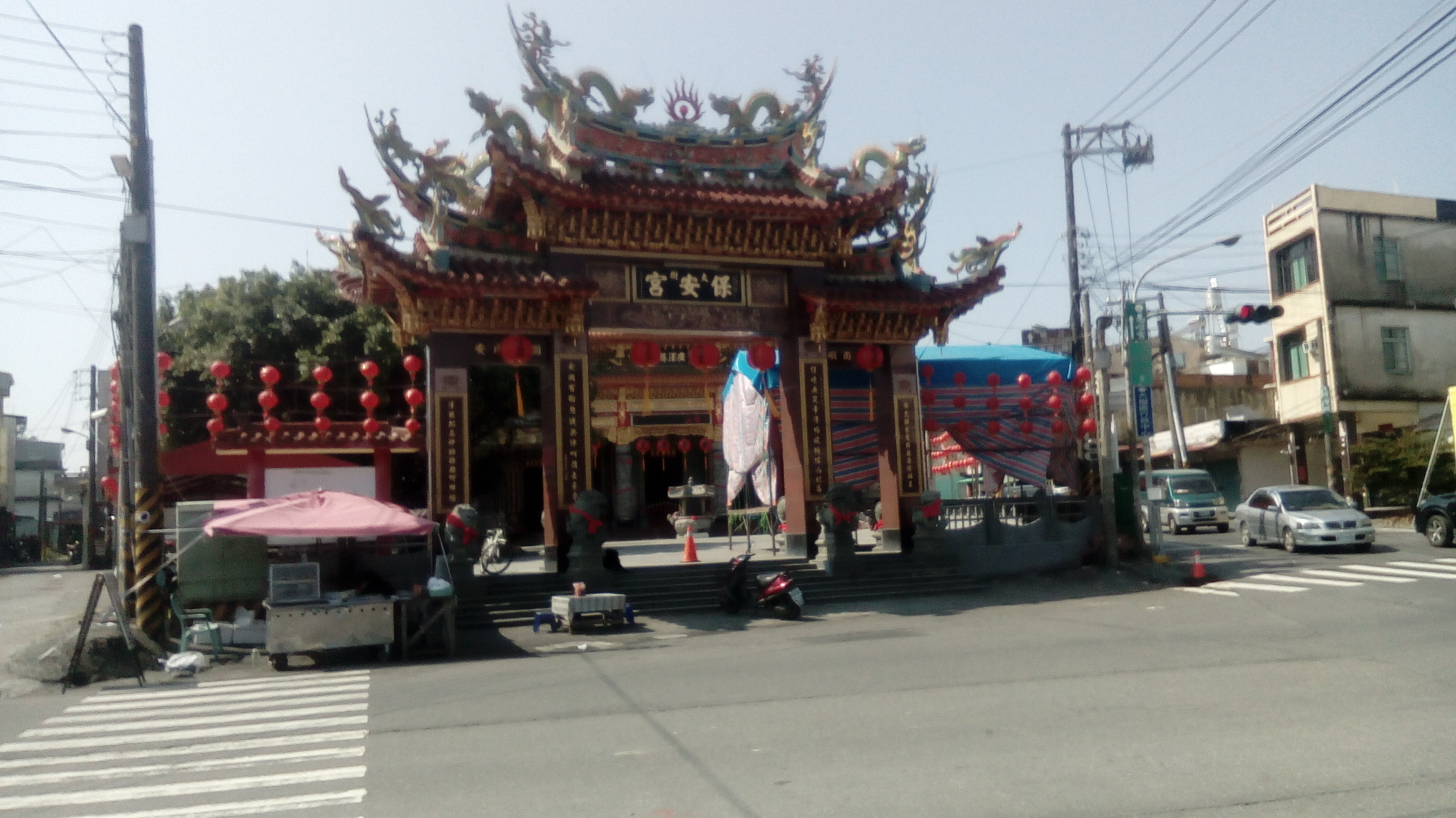 大樹區大樹路71號